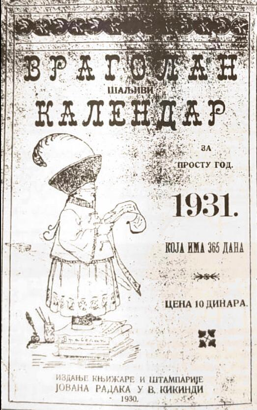 корица календара враголан ког је штампао Јован Радак